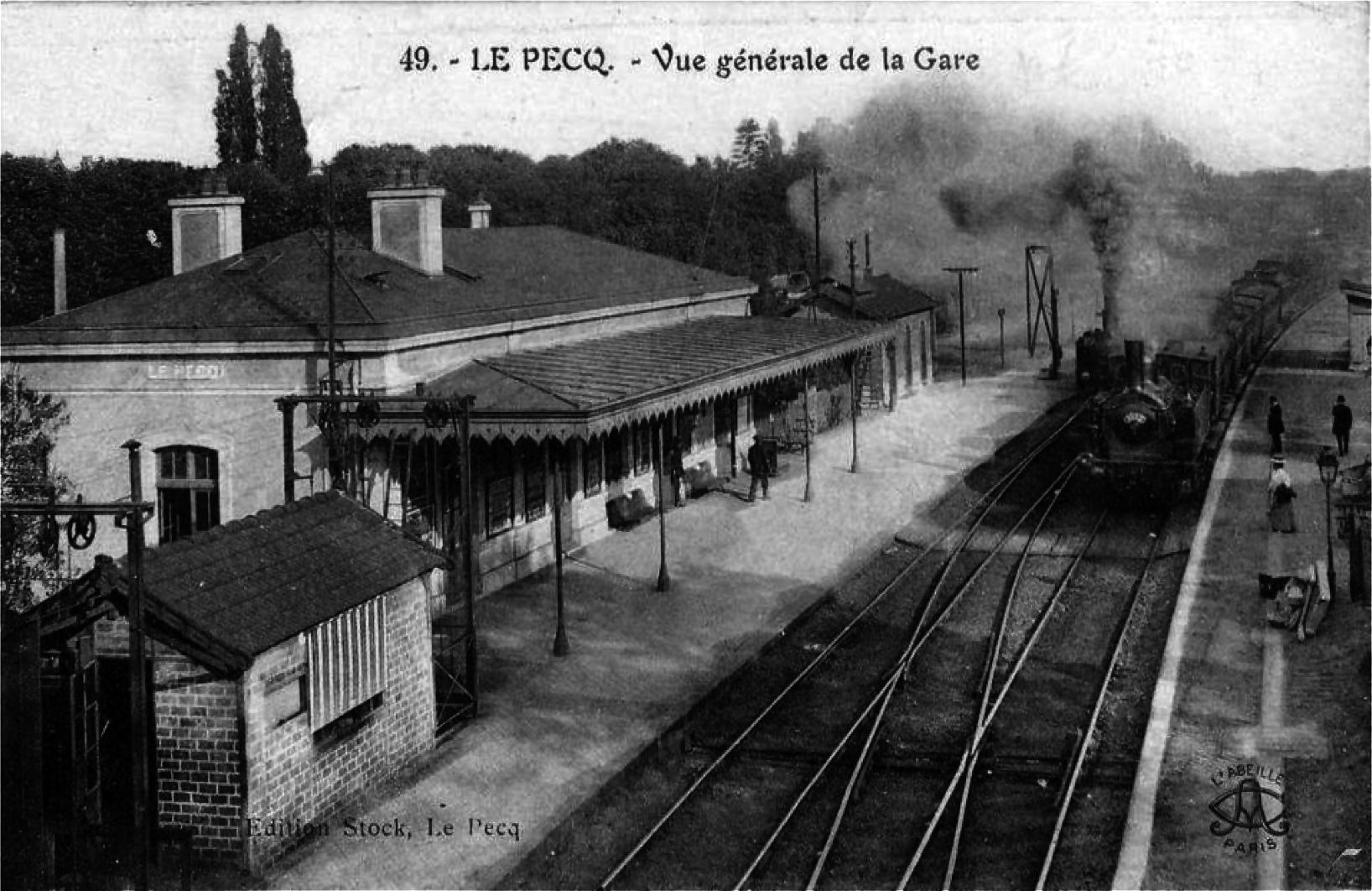 La gare du Pecq avec le bâtiment voyageurs construit en 1847.